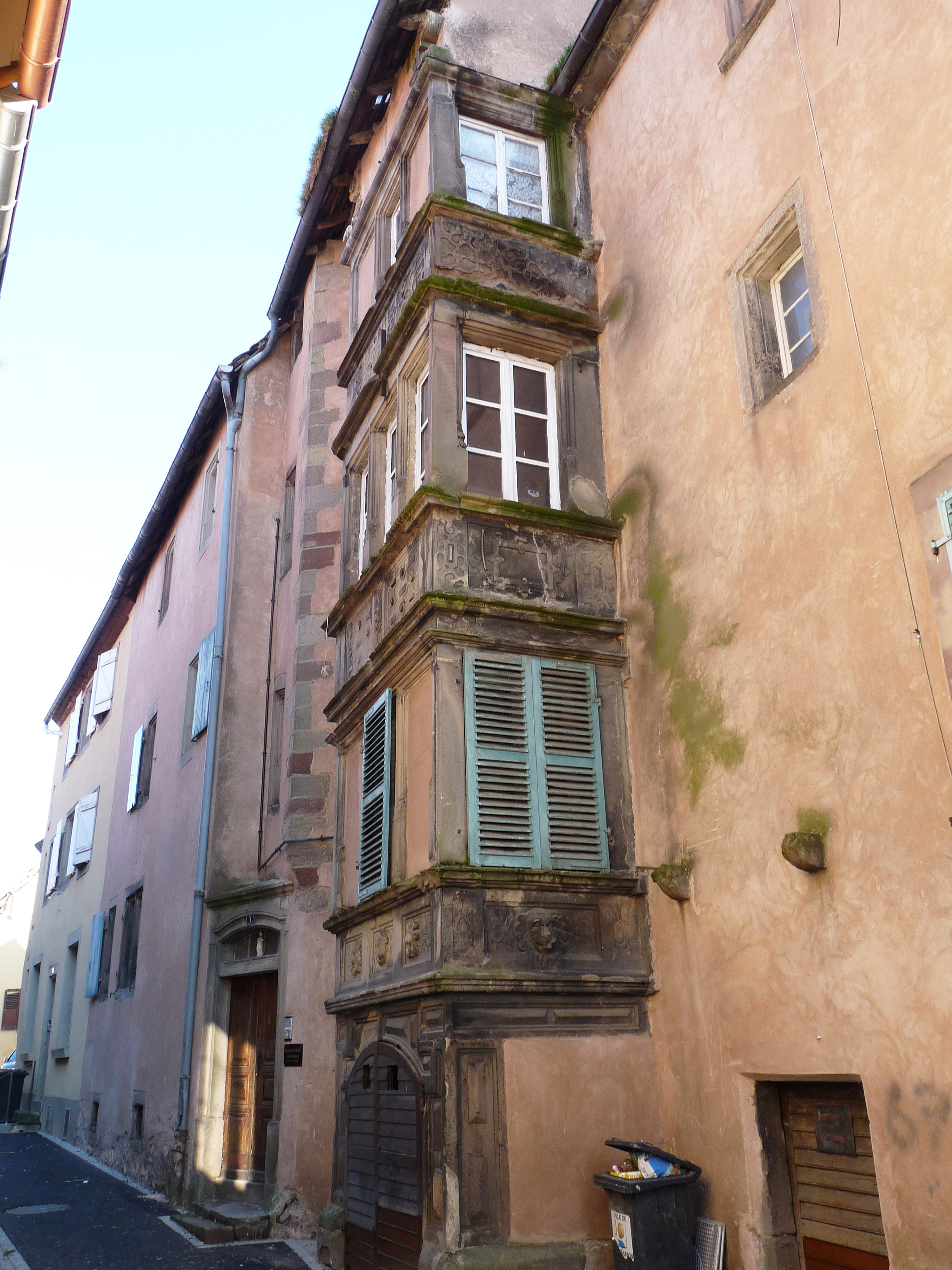 Sarre-Union (67) : maison